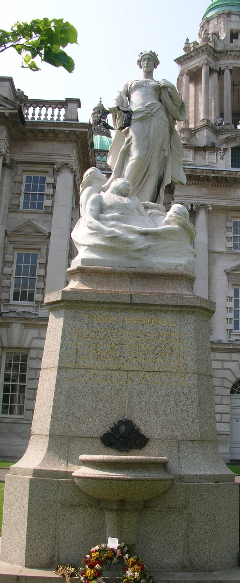 Mémorial des victimes nord-irlandaises du Titanic dans sa ville natale de Belfast